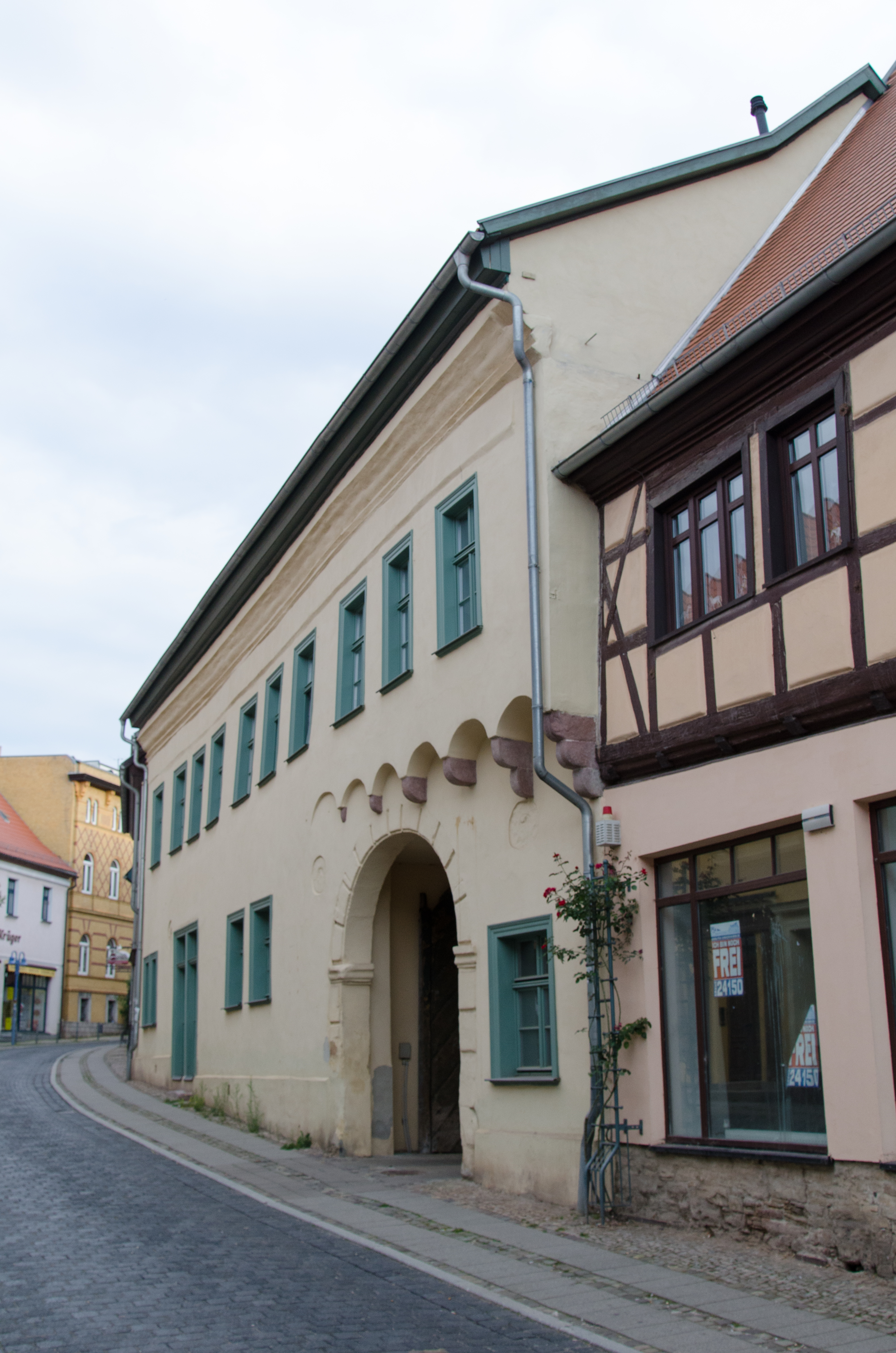 Sangerhausen, Alte Magdeburger Straße 9